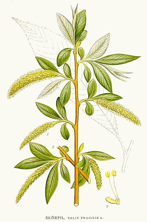 Original Description Skörpil, Salix fragilis L.